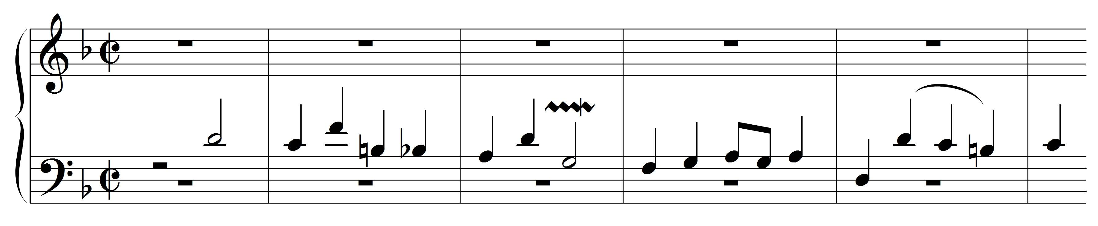 Bach, JS, Incipit Contrapunctus 8, BWV 1080